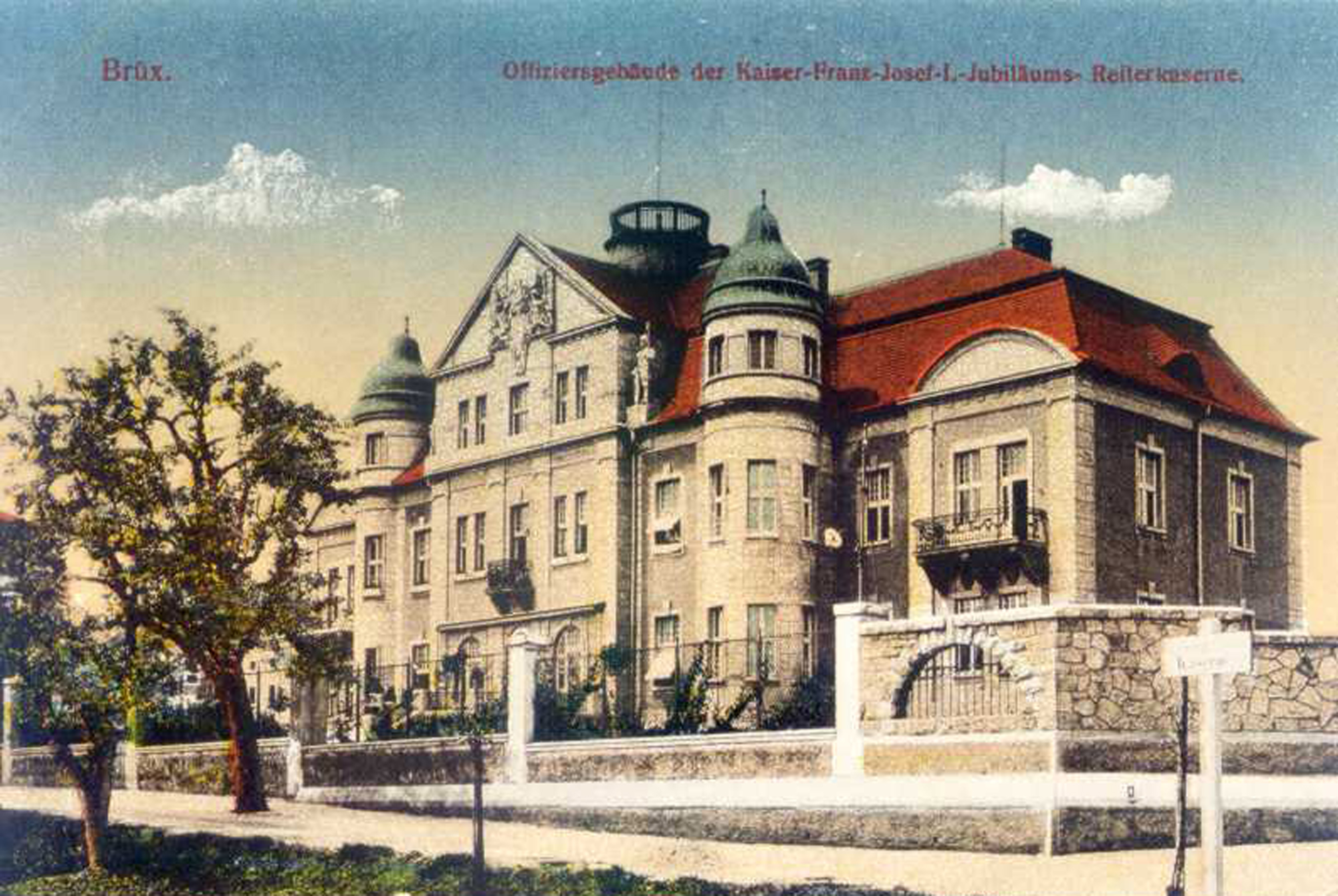 Mostecká kasárna - důstojnický pavilón na křižovatce ulic Čsl. armády a Jana Opletala